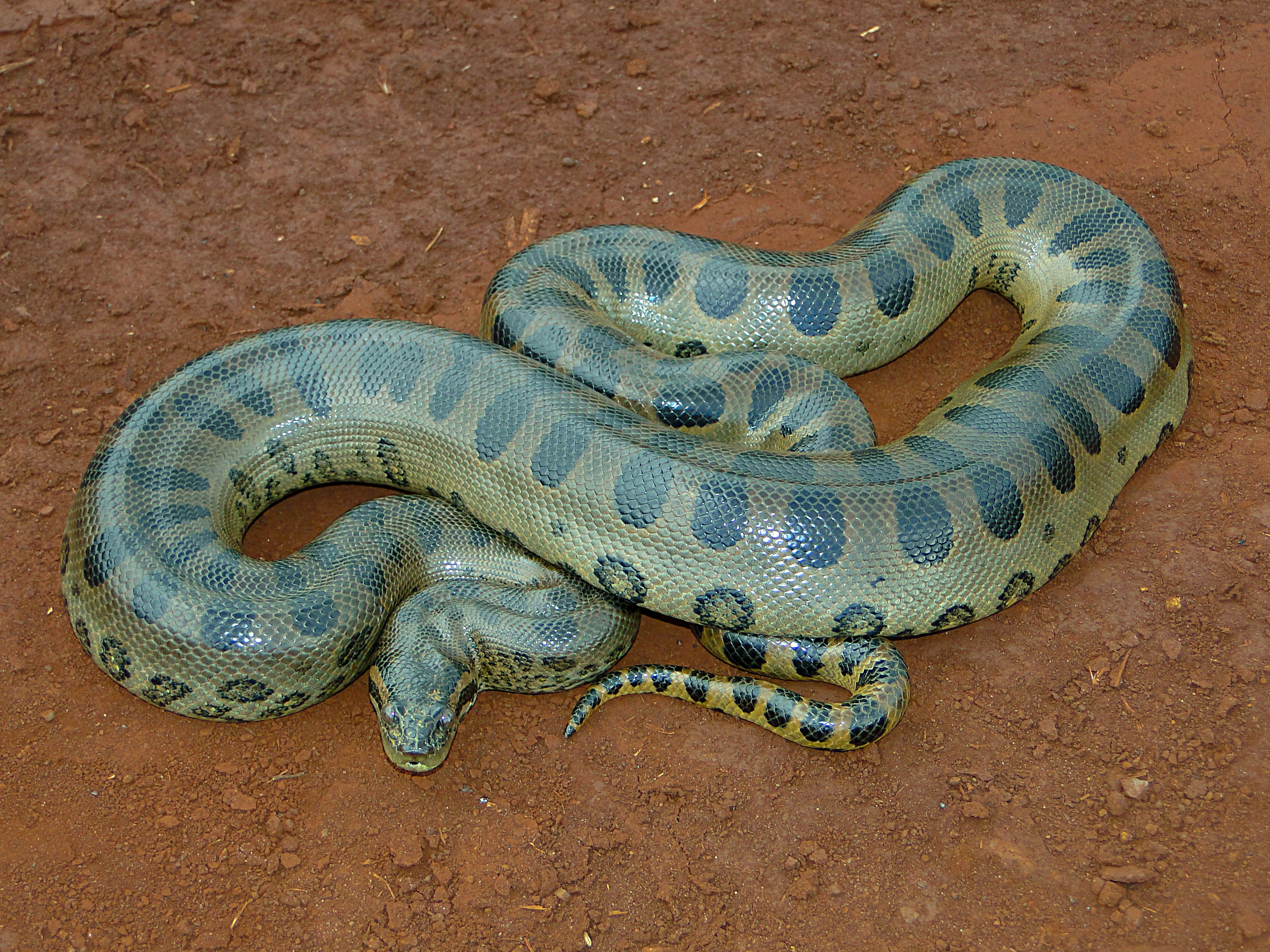 cobra snake sucuri verde rio pardo constritora anaconda Eunectes murinus